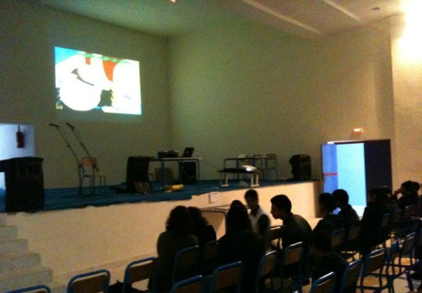 La toute premiére édition de la Manga Afternoon